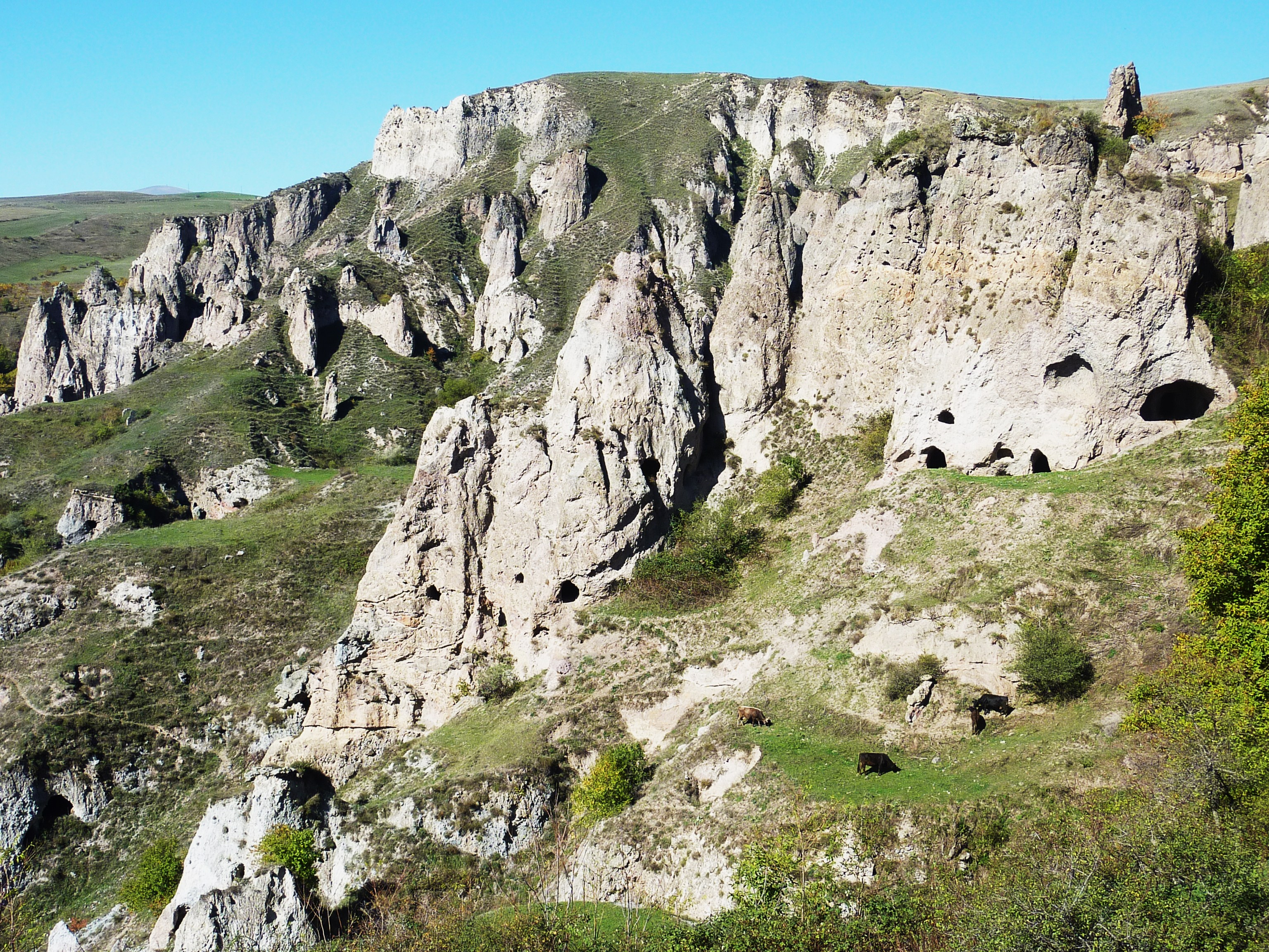 Village troglodytique de Khendzoresk : vue d'ensemble